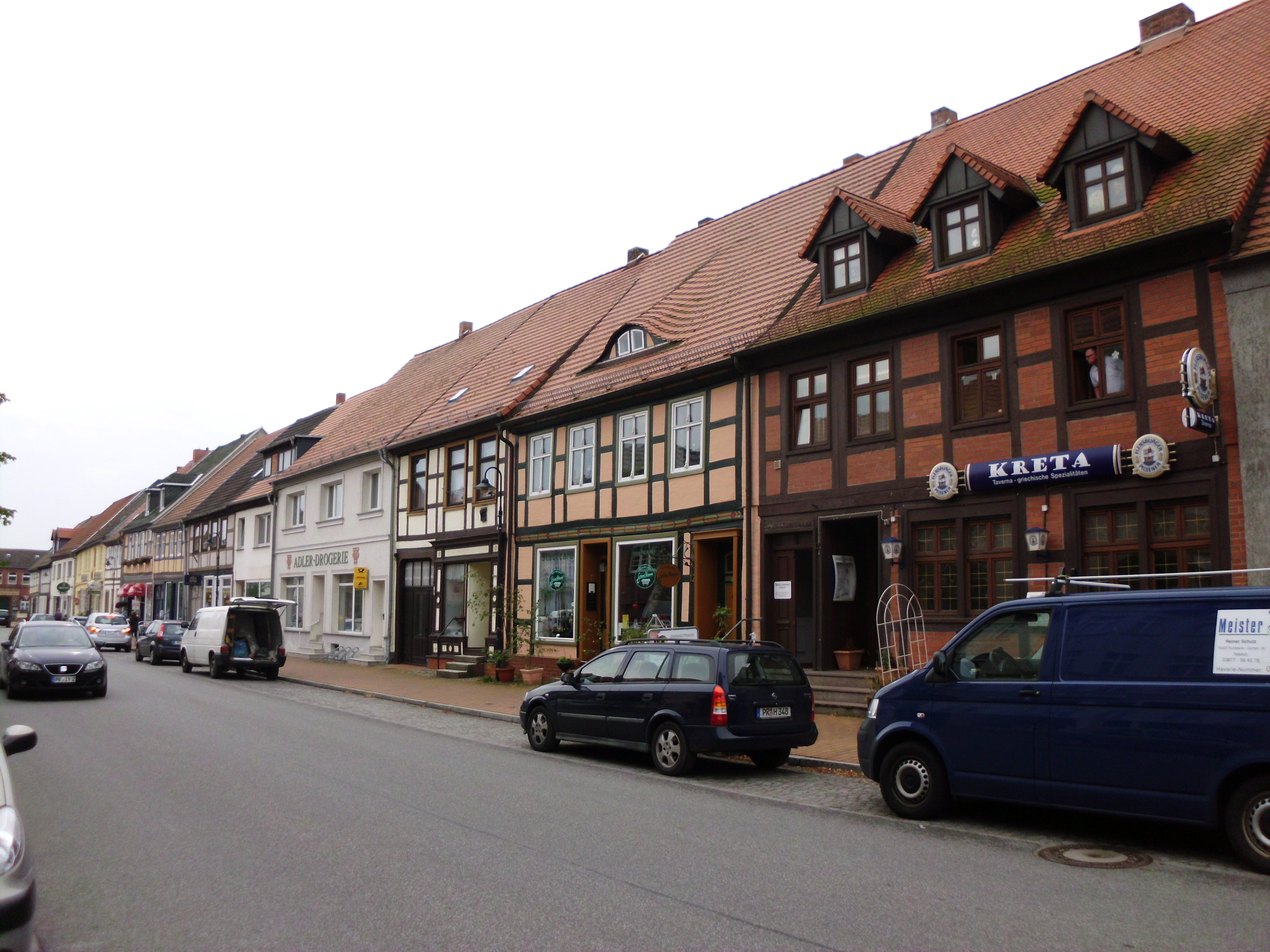 denkmalgeschützte Altstadt von Bad Wilsnack